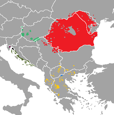 Lenguas balcorromances Lenguas balcorrumanas: Rumano Istrorrumano Meglenorrumano Arrumano Dalmático †: Vegliota † Ragusano † Panonio Panonio †